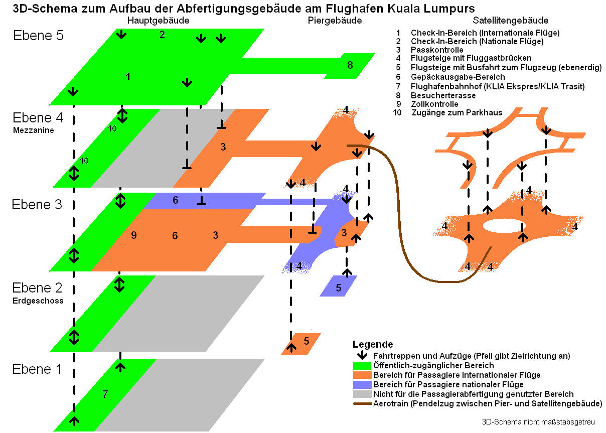 levels at KLIA terminal